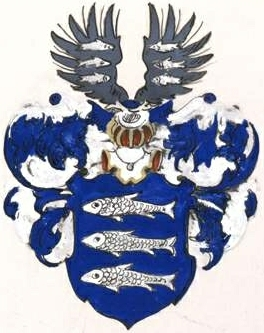 Derfeldeni suguvõsa aadlivapp